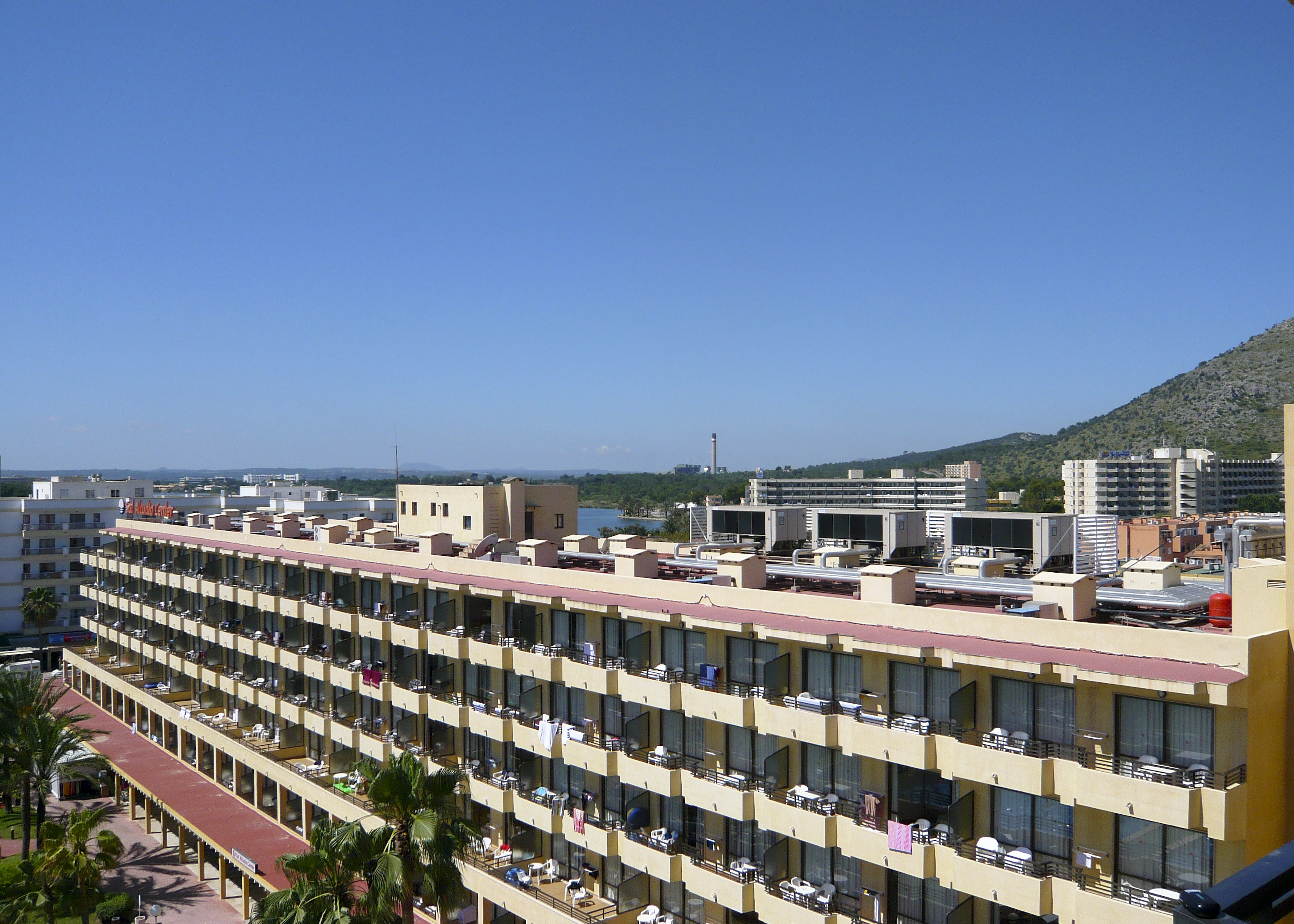 Sol Alcudia Center